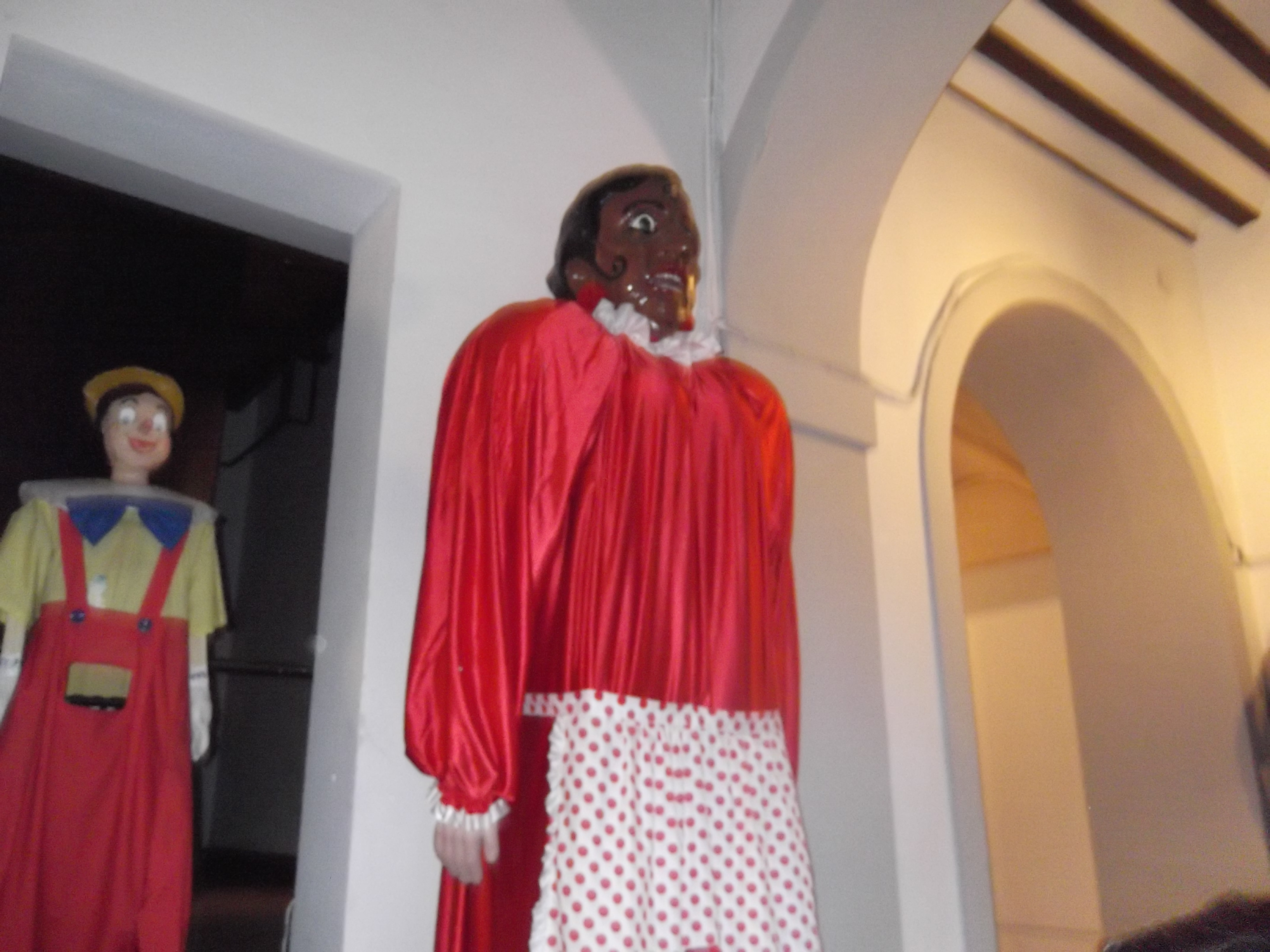 Gigantes de Alcalá de Henares